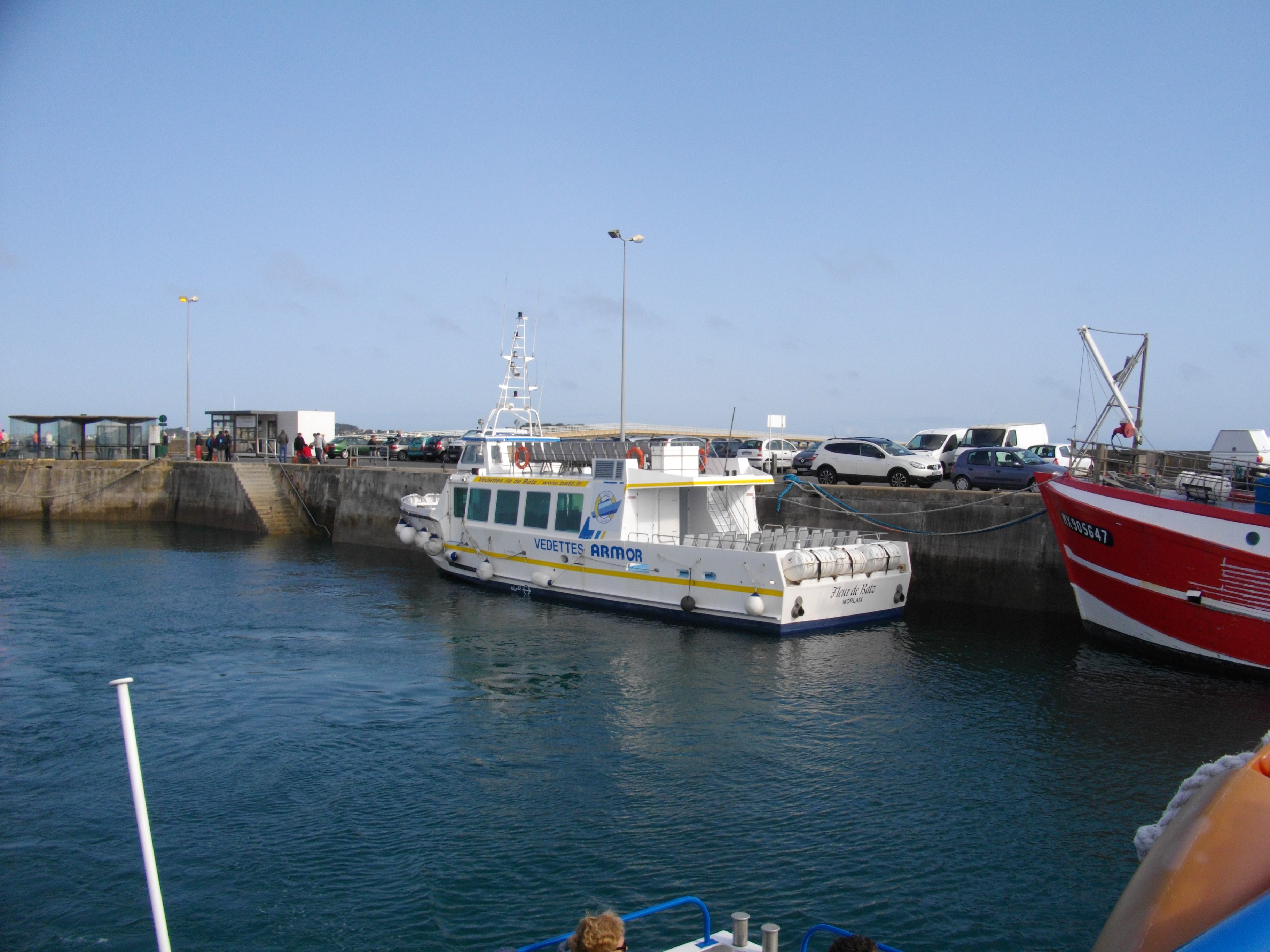 La vette Fleur de Batz au port de Roscoff